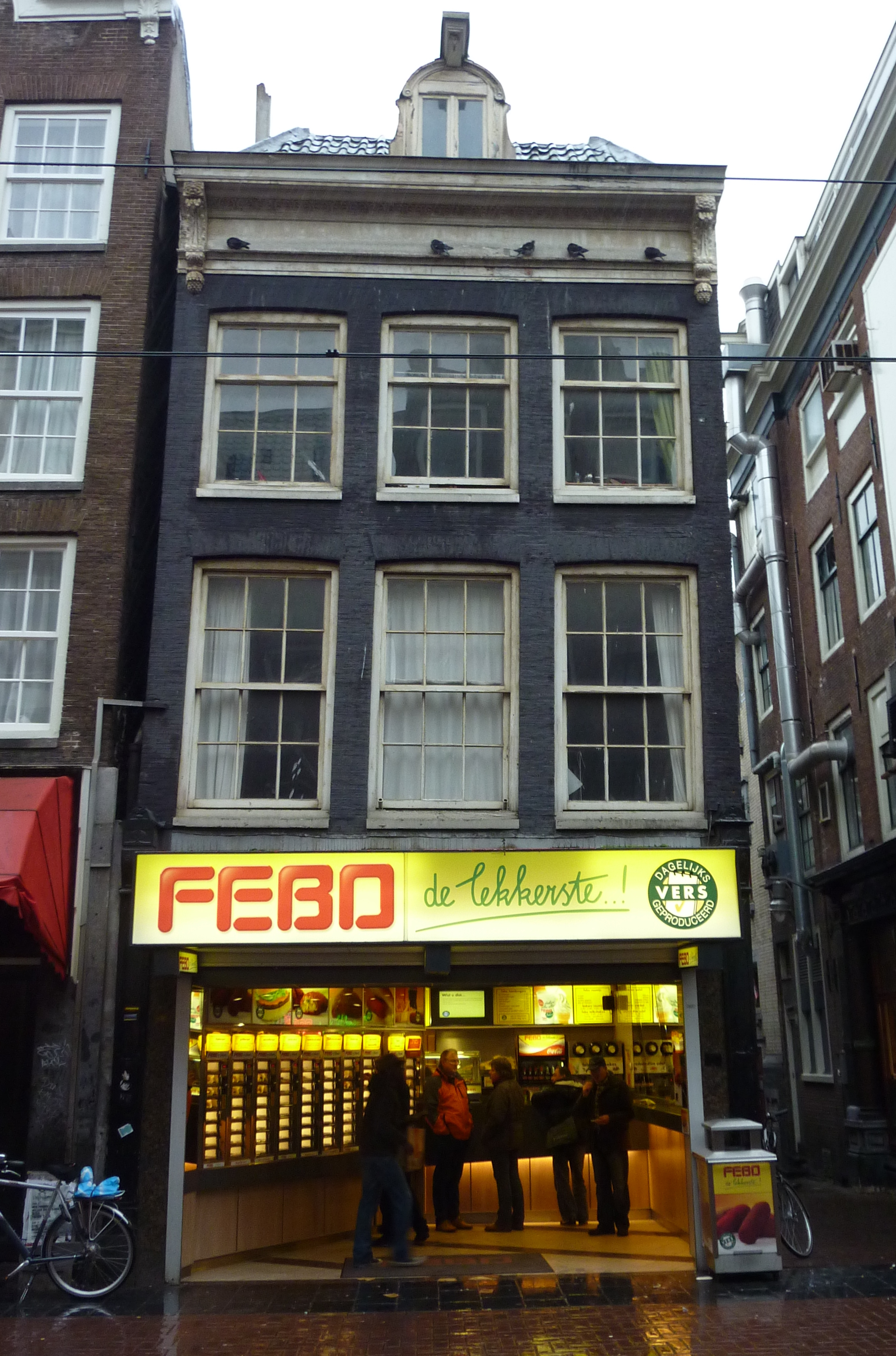 Amsterdam, Reguliersbreestraat